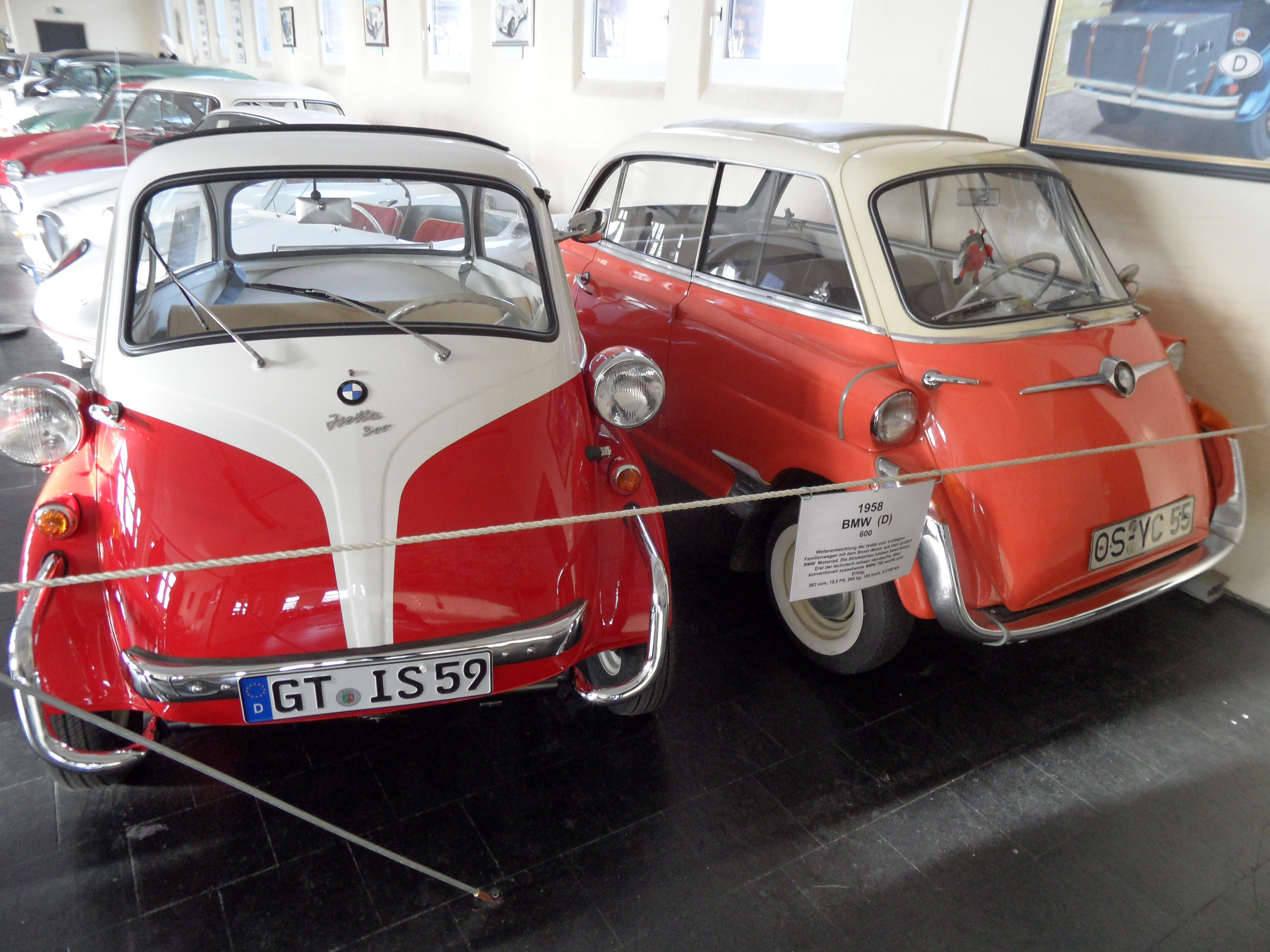 BMW Isetta 300 z 1959 i BMW 600 z 1958 w muzeum w Melle